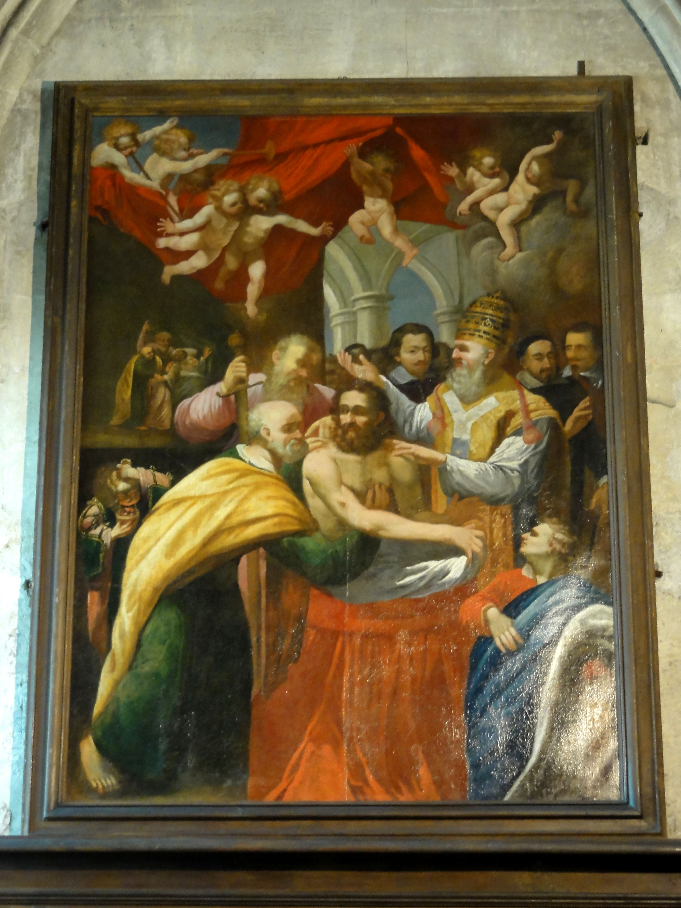 Bas-côté sud, tableau accroché au revers de la façade occidentale, Baptême de Clovis, anonyme, XVIIe siècle.